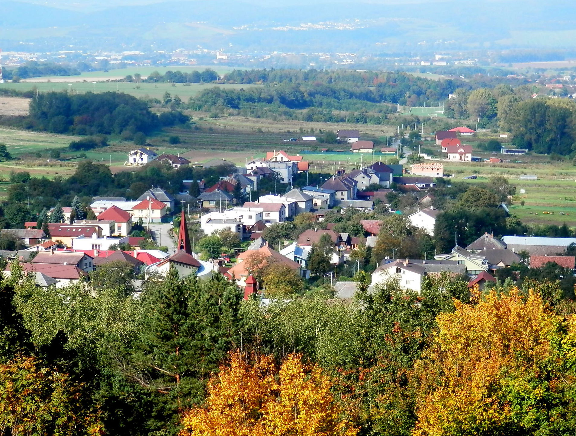 Obec Podhradík, okres Prešov.